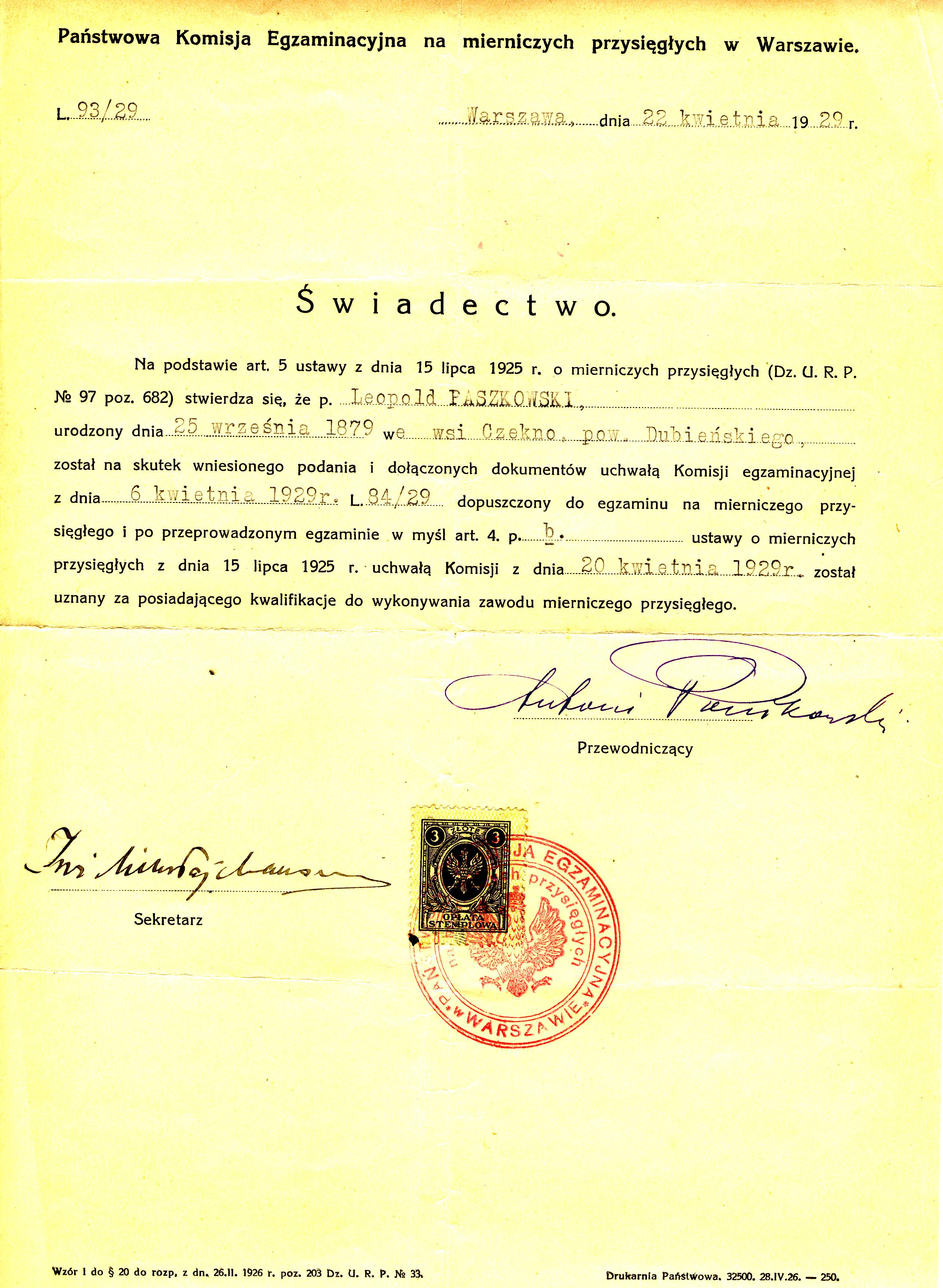 Świadectwo z egzaminu mierniczego przysięgłego Zenon Paszkowski, Polacy z Kresów Wschodnich na Warmii i Mazurach - Leopold Kleofas Paszkowski